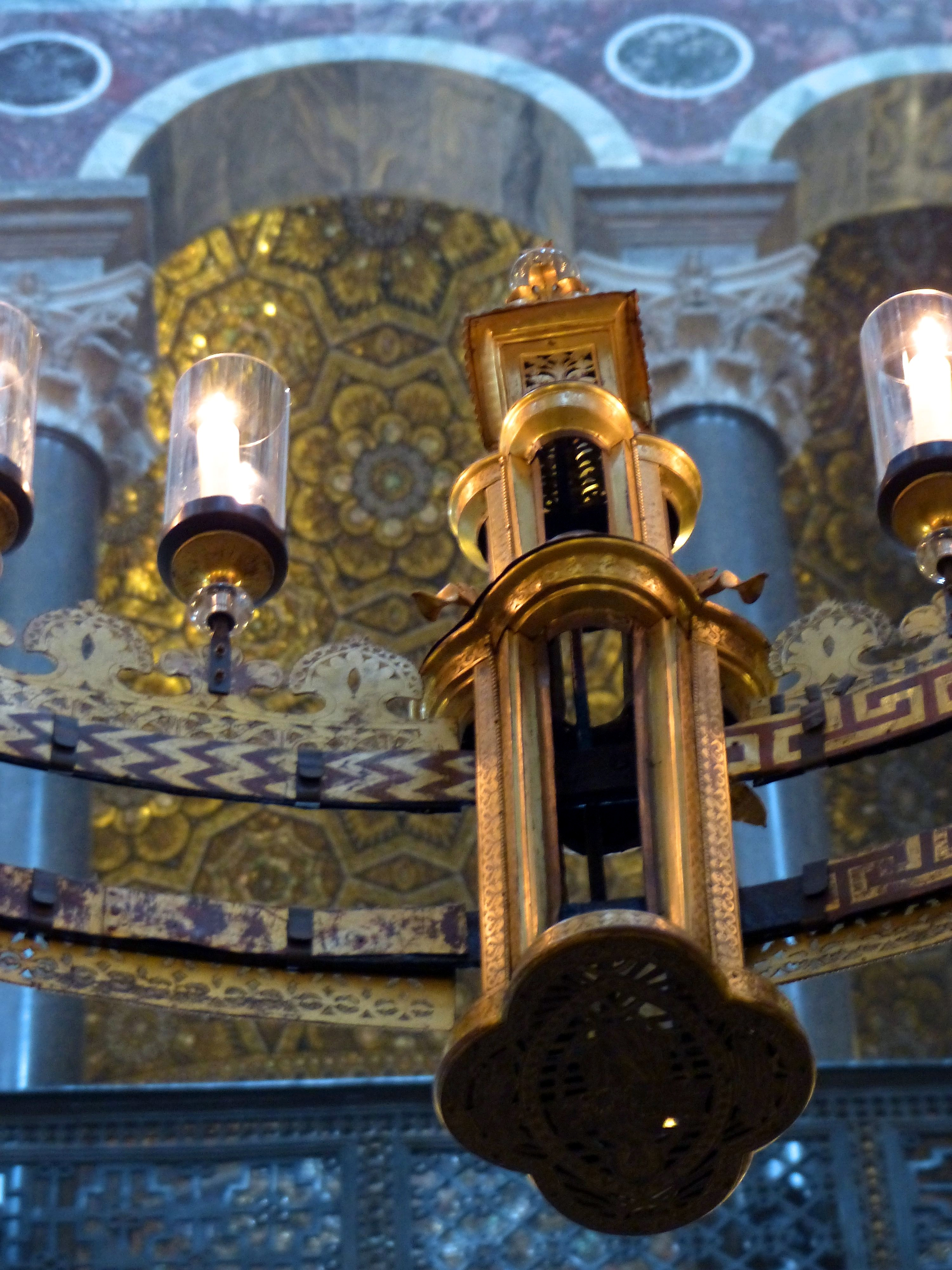 Barbarossaleuchter im Aachner Dom Ostersonntag 2014 (Detail)